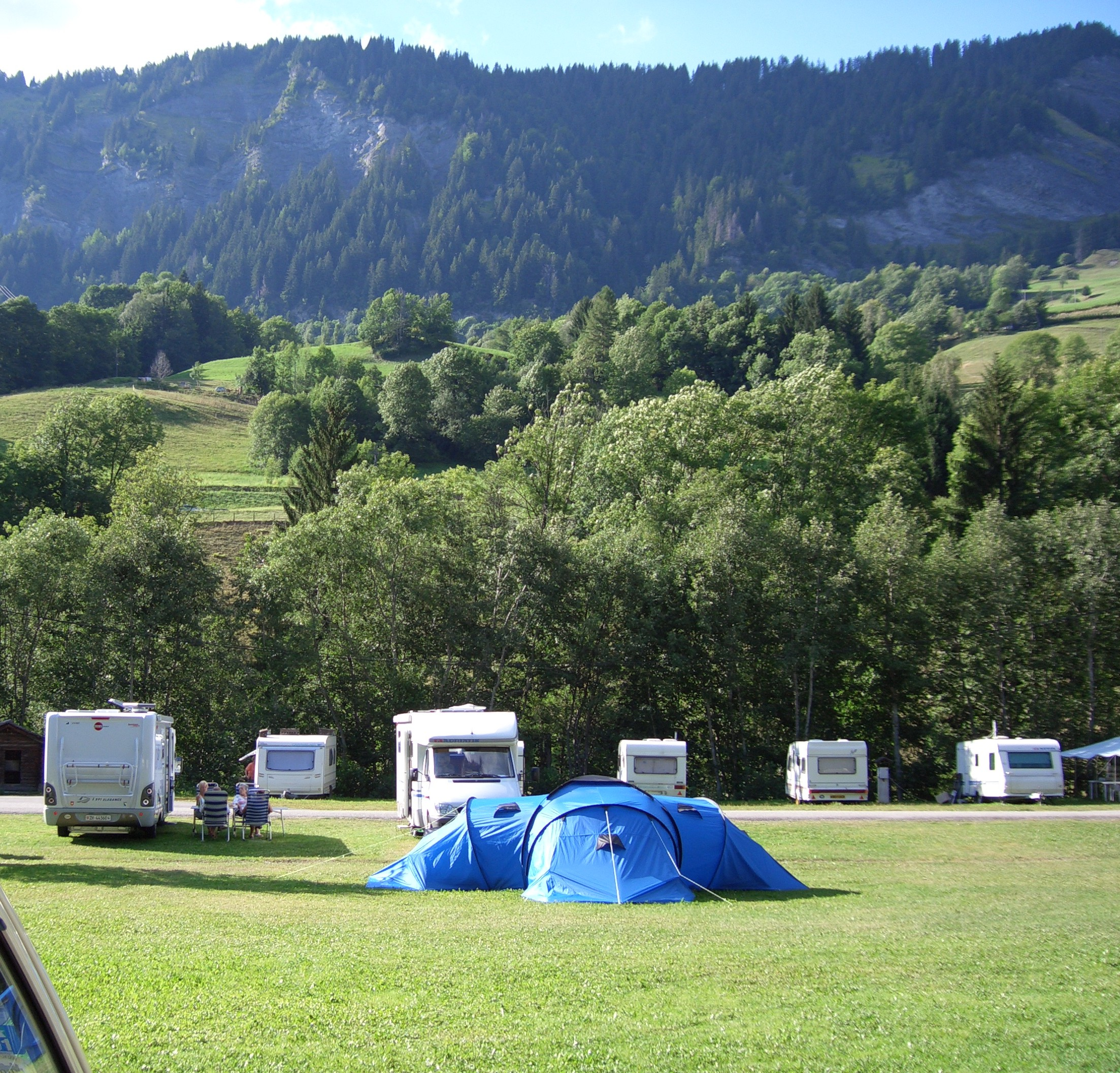 Campsite in Flumet, France/ Place à Camping à Flumet, France/ Campingplatz in Flumet